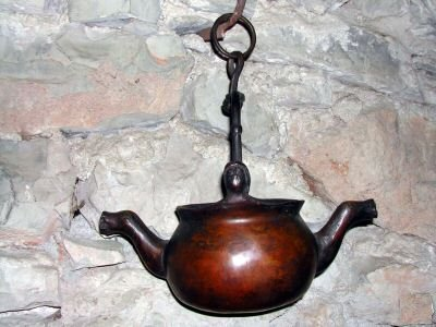 Puisette ustensile en bronze utilisé autrefois au moyen age dans un lavabo, pour puiser l'eau